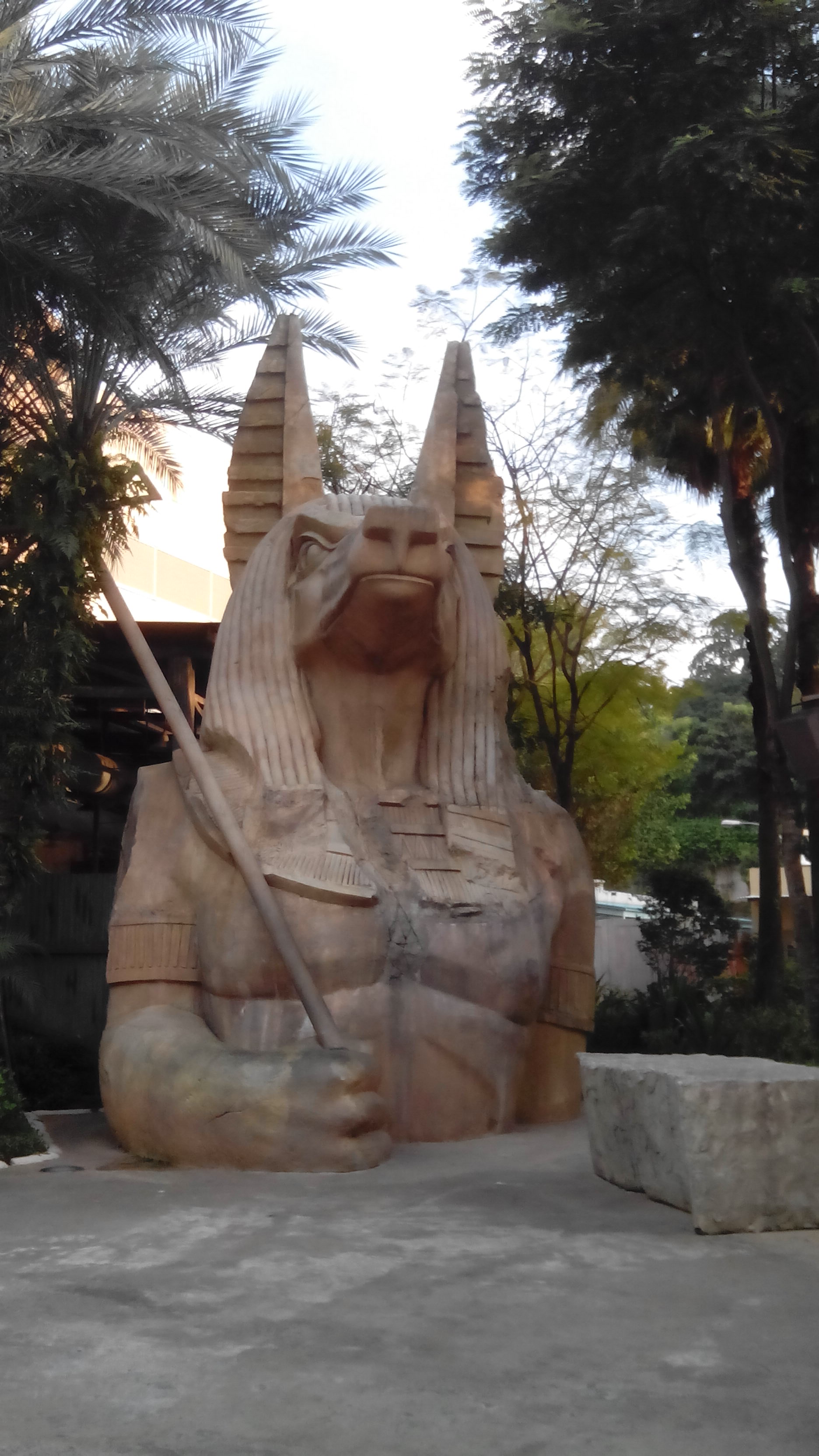 中文（香港）: 古埃及園區的雕像